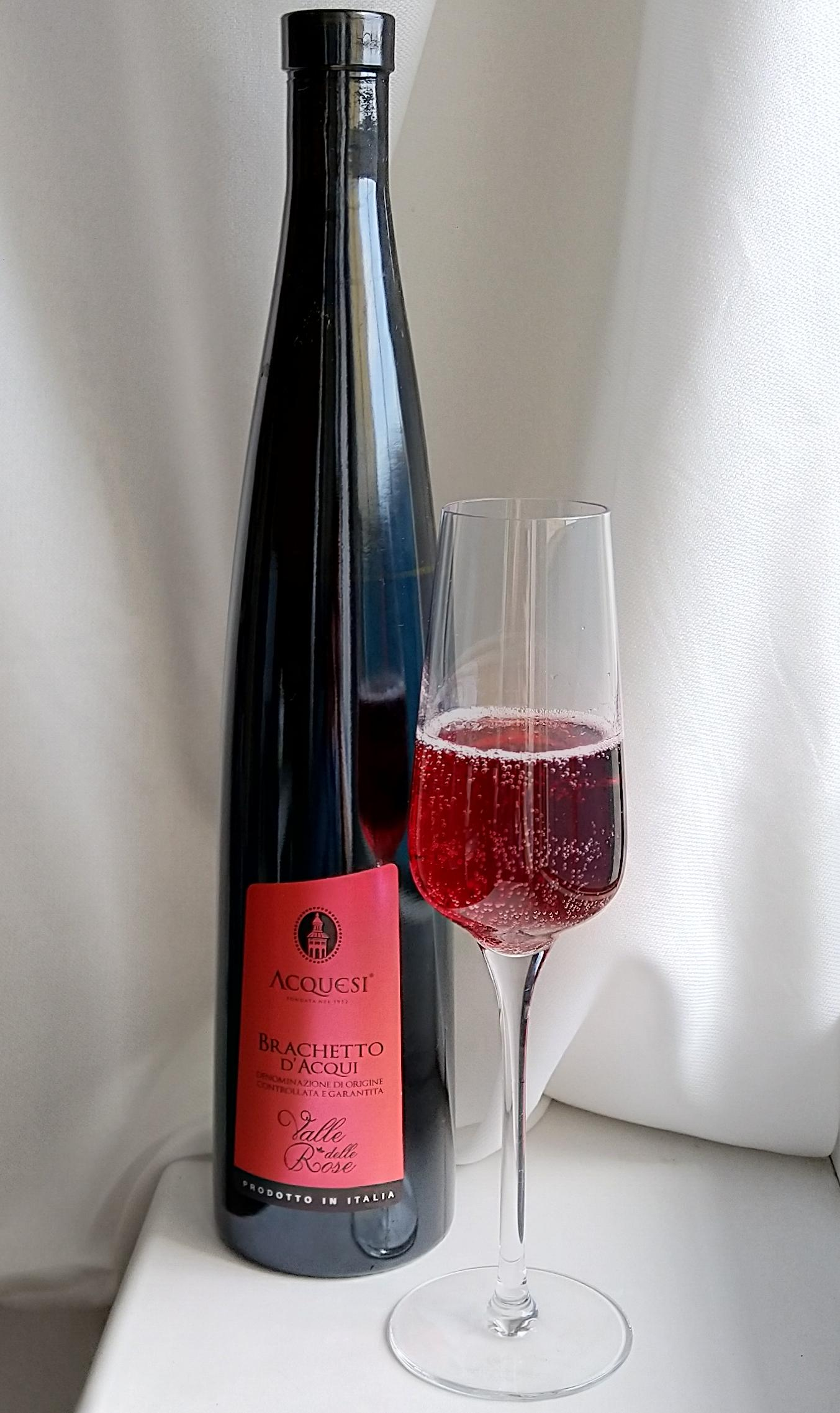 Glass of Brachetto wine